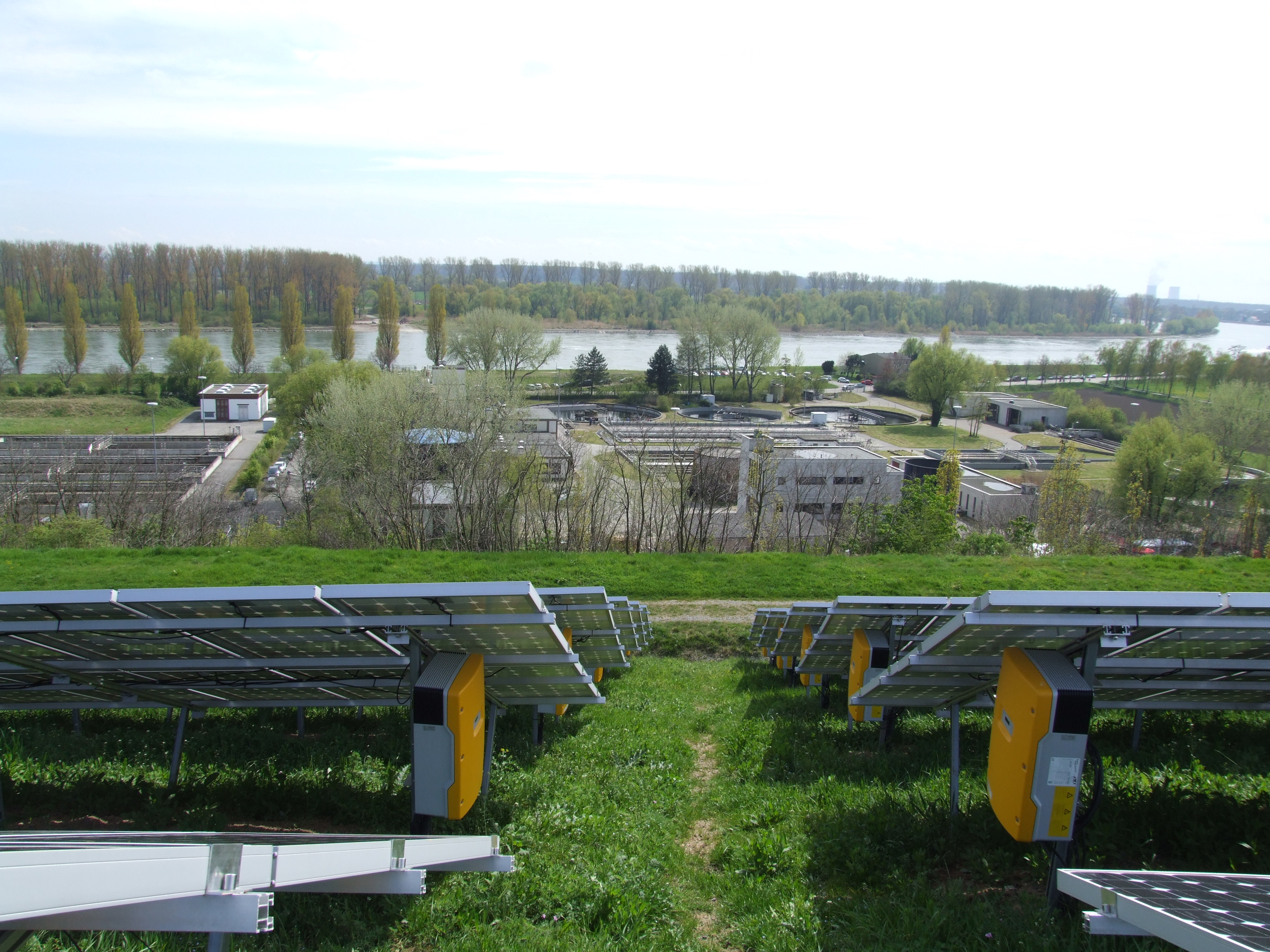 Müllberg Speyer: Rückseite der östlichen Solarpanele, Wechselrichter von SMA Solar, unten die Kläranlage Speyer; dahinter der Rhein